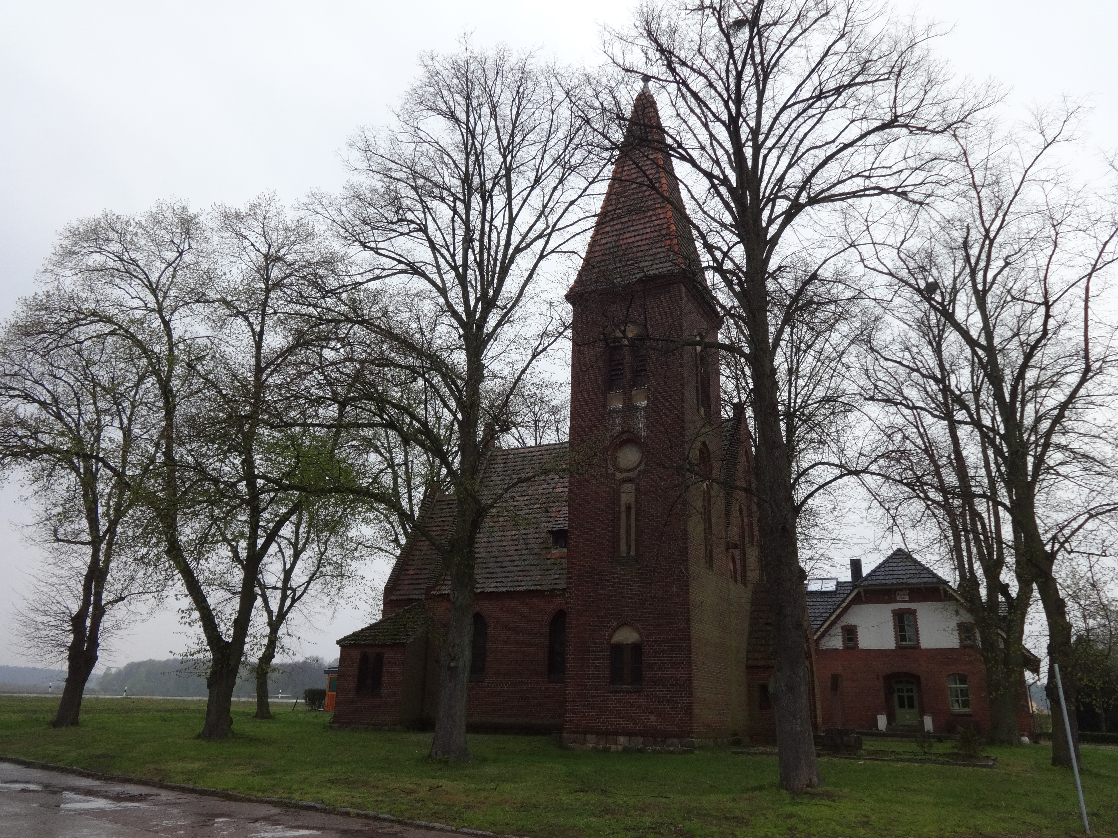 Die Dorfkirche in Rottstock ist eine neugotische Saalkirche in Rottstock, einem Ortsteil der Gemeinde Gräben im Landkreis Potsdam-Mittelmark in Brandenburg. Auffällig ist der an der Nordseite asymmetrisch positionierte Turm.